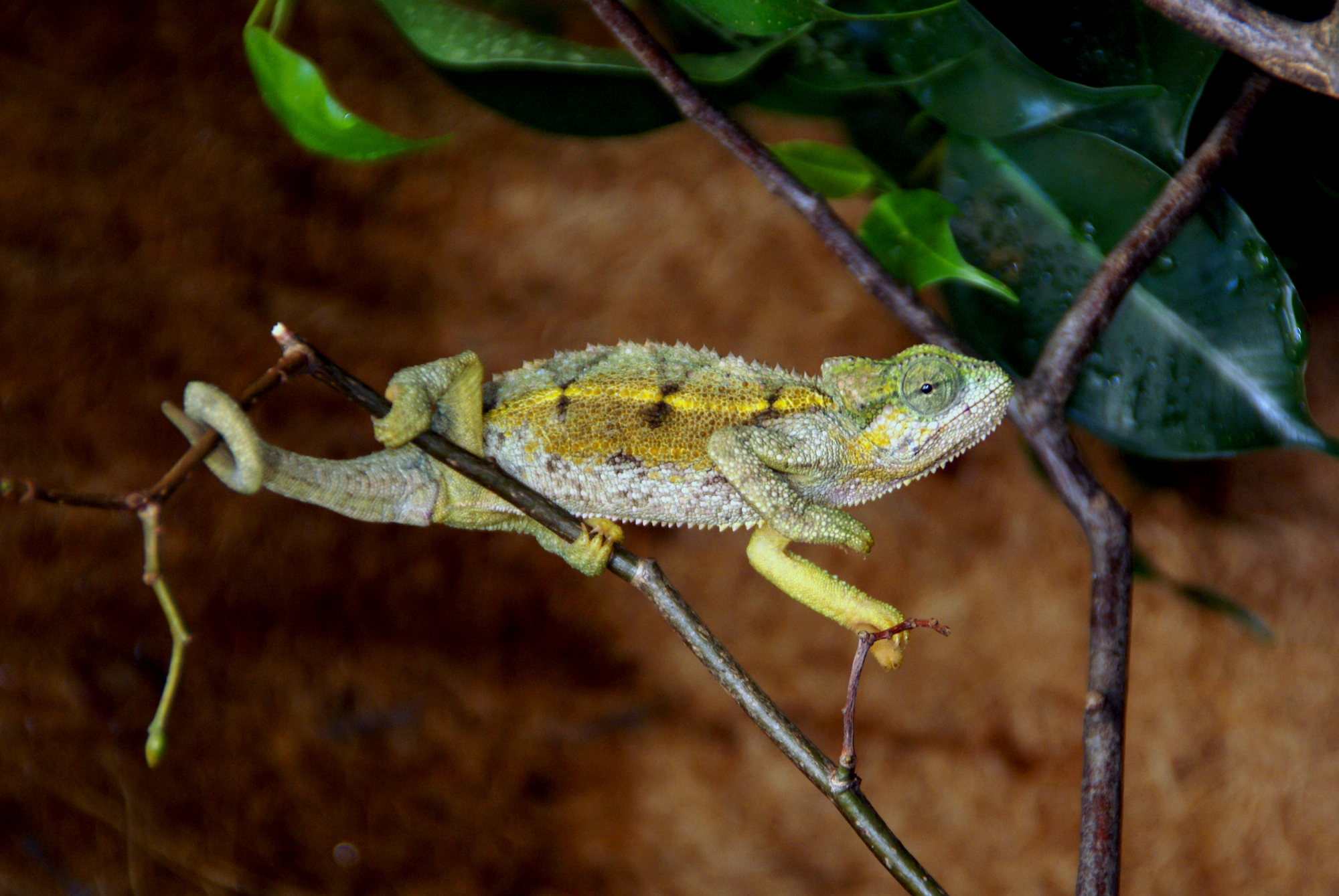 Chamaeleo rudis, Männchen in Ruhefärbung